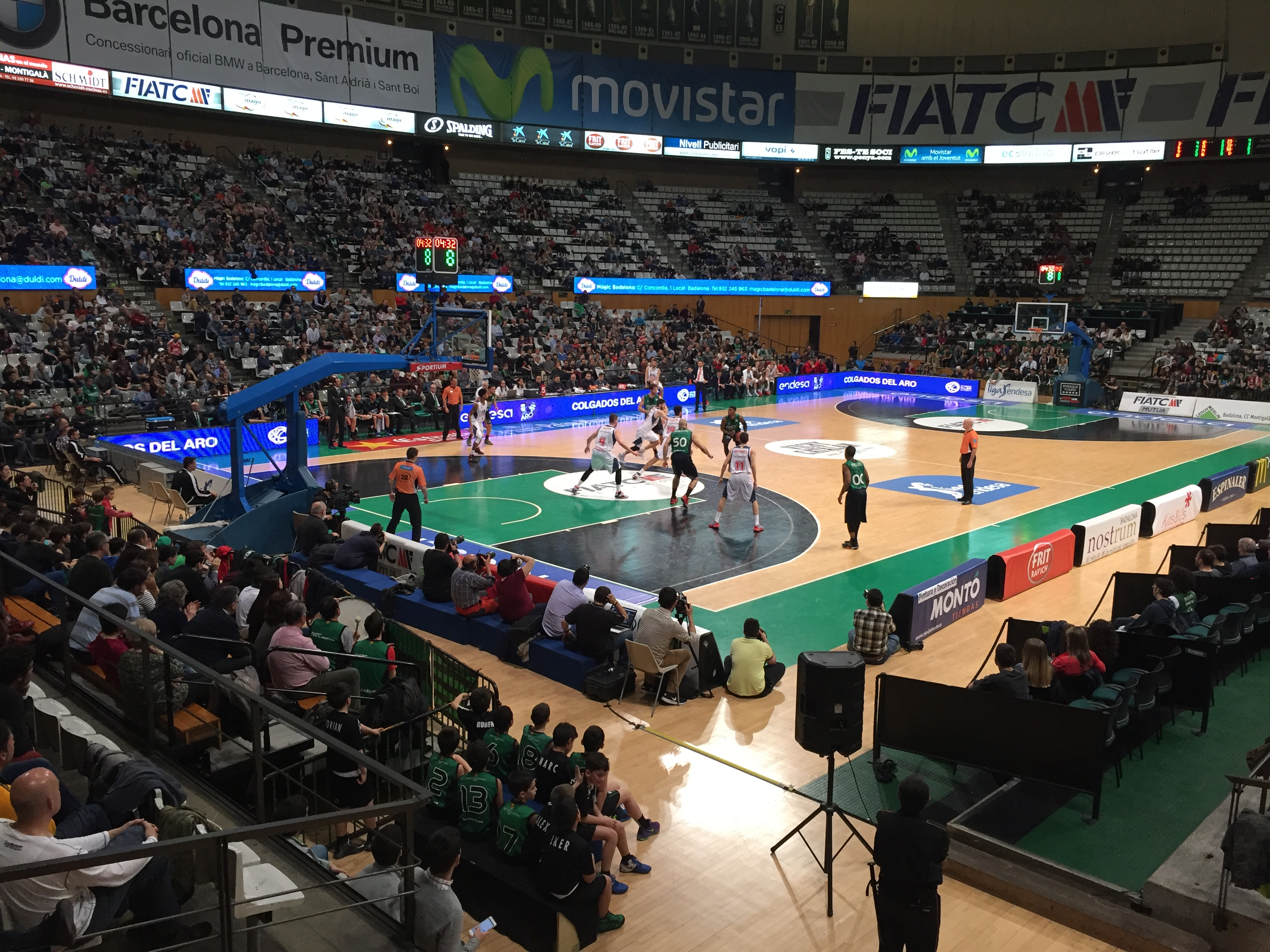 Partit de Lliga ACB a l'Olímpic de Badalona entre el FIATC Joventut i l'ICL Manresa